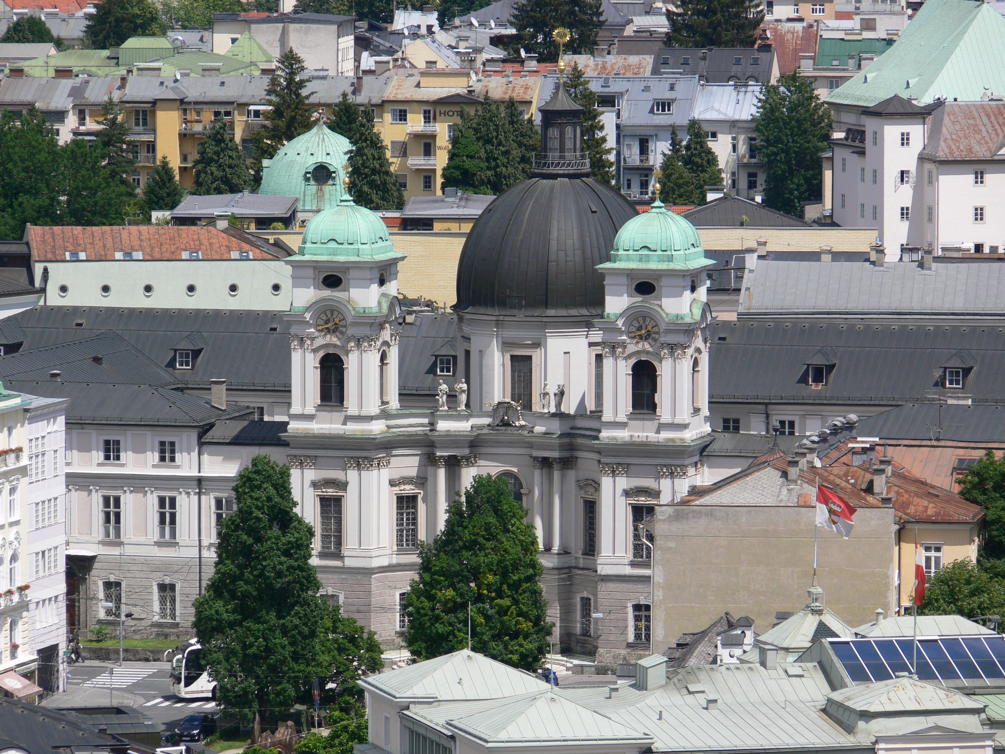 Salzburg, Aussicht vom Mönchsberg Dreifaltigkeitskirche